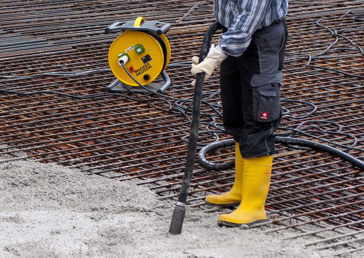 Wacker Neuson Innenrüttler IREN im Baustelleneinsatz